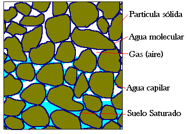 Estados del agua en el suelo. Autor: Alfredobi. Guayaquil, febrero 2006